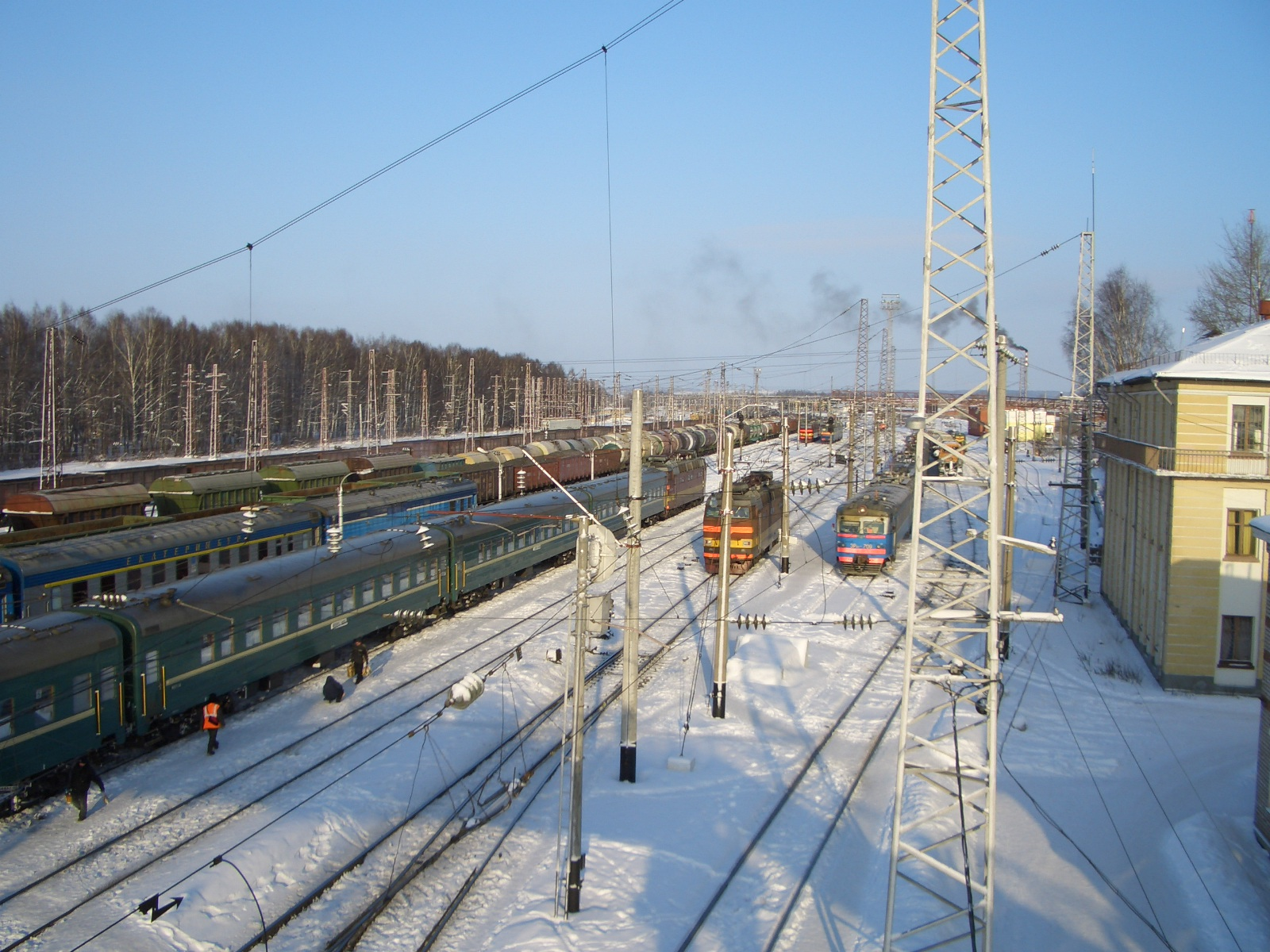 Trains at Balezino station